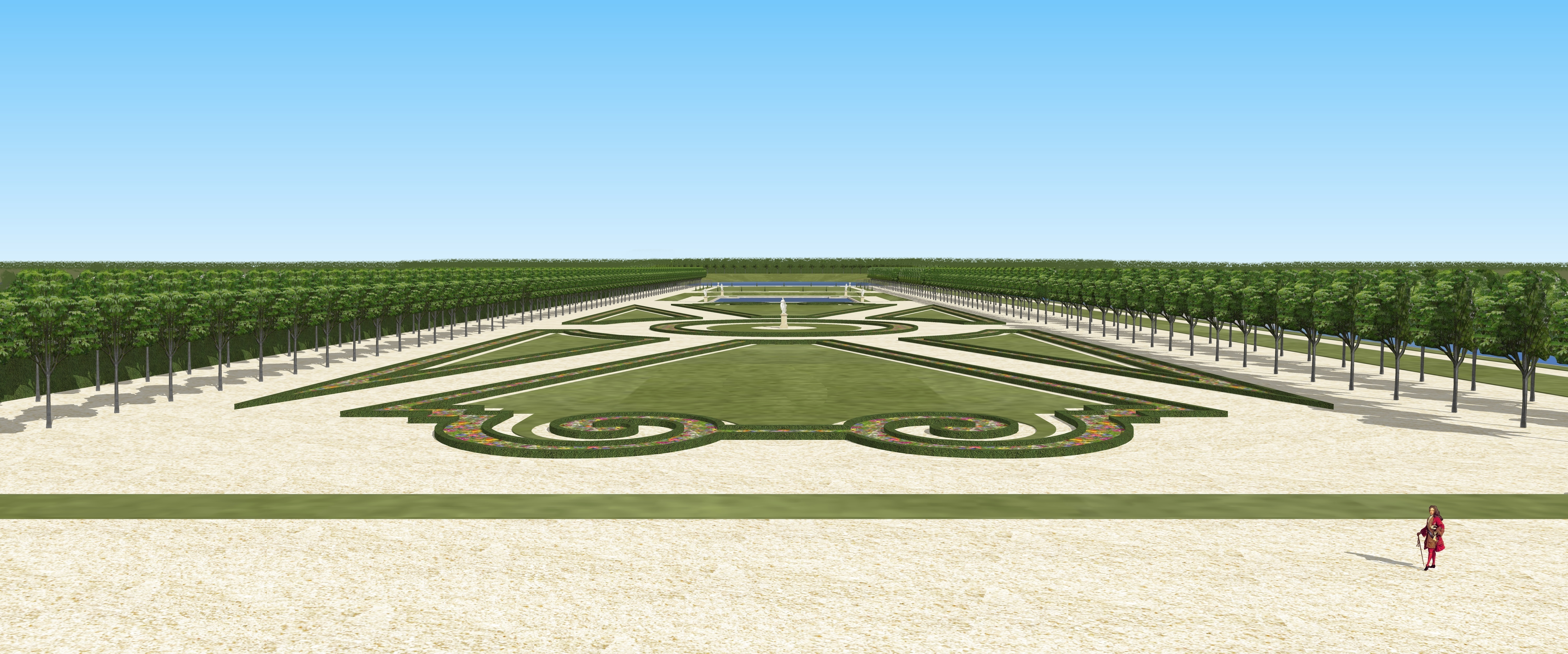 Vue du grand parterre du château de Rambouillet vers 1710